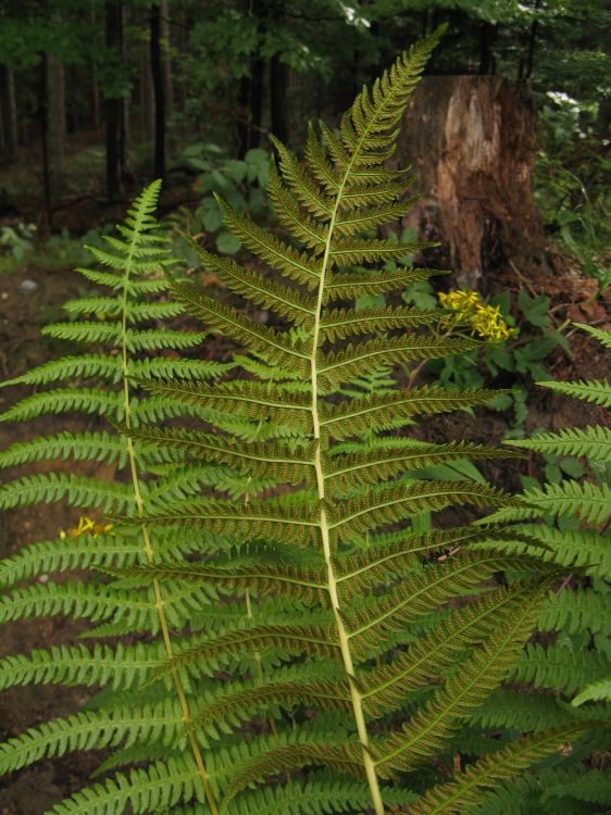 Pérnatec horský Bor u Skutče